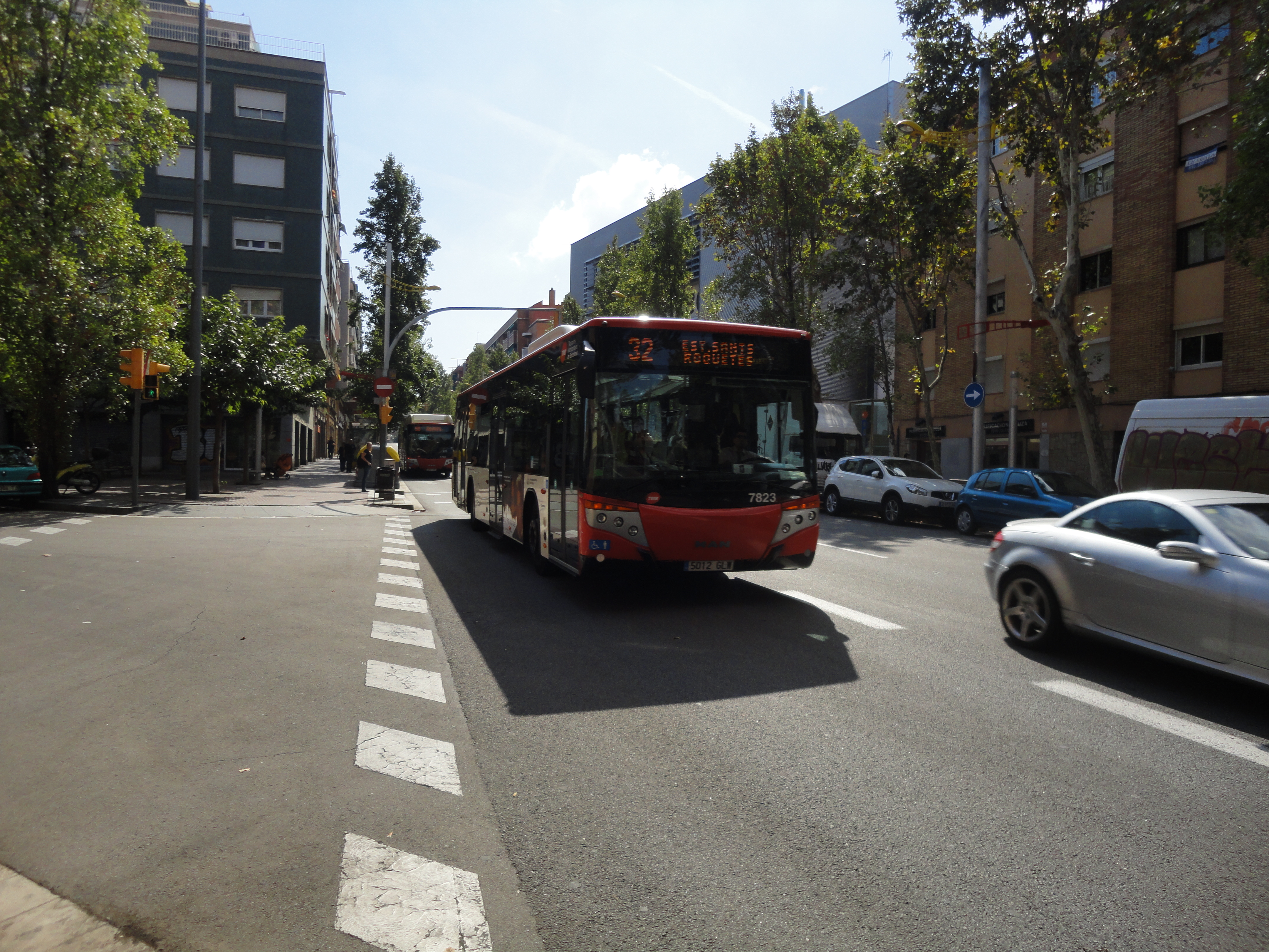 Autobús de Barcelona